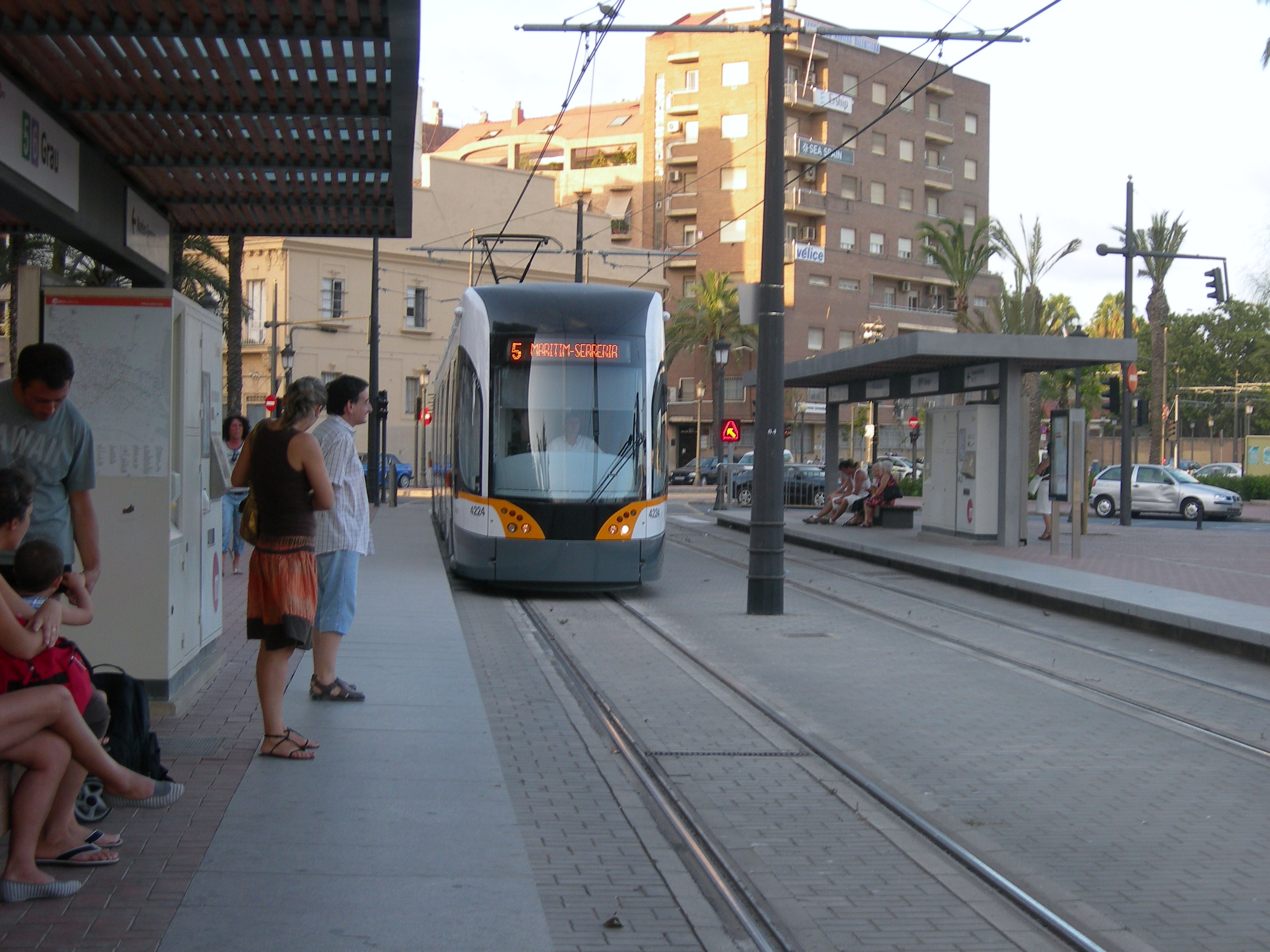 Tranvia entrando a la estación.